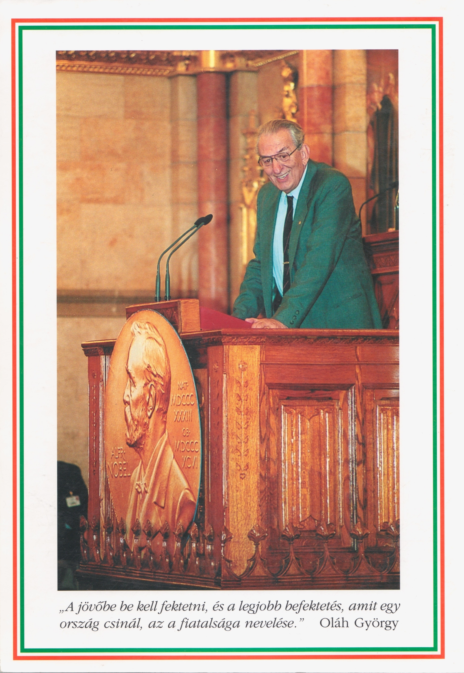 A 2000-es tudóstalálkozó konferenciakiadványának hátlapja – Oláh György 2000-ben, az Országgyűlés üléstermében